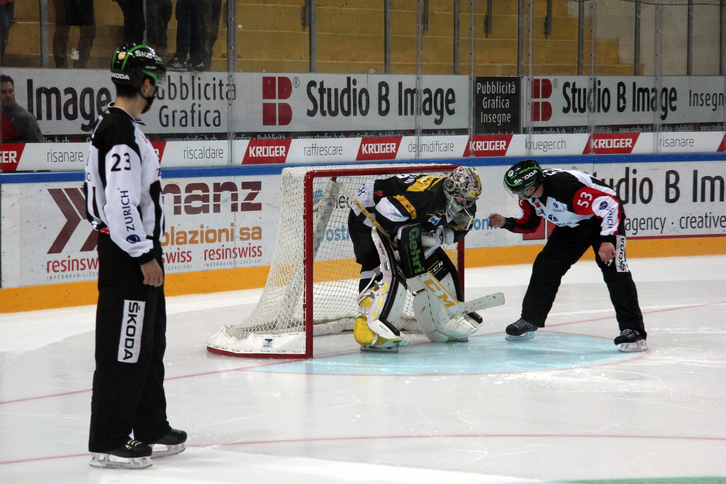 Balazs Kovacs (R 23), Elvis Merzlikins (L 30), Lars Brüggemann (R 53). Tir au but.